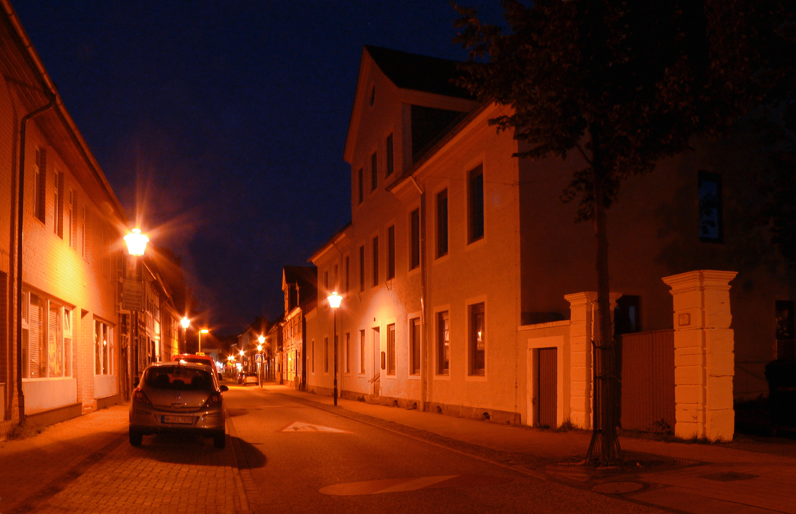 Früheres Amtsgebäude in Vorsfelde